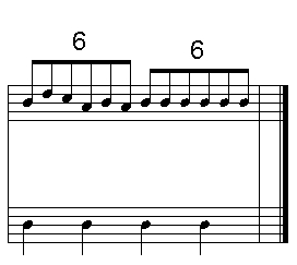 Seisillo, subdivisión musical